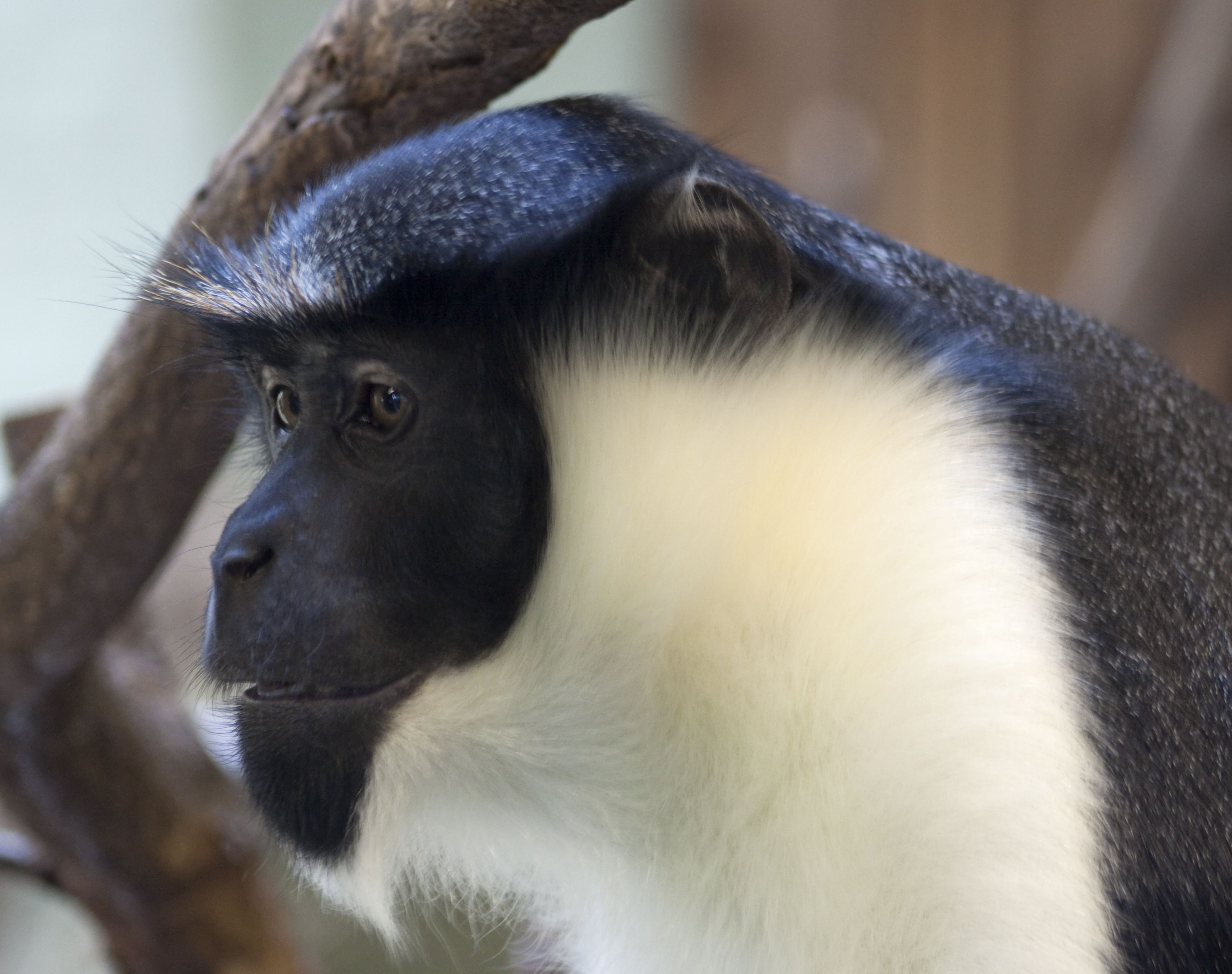 Diana Monkey